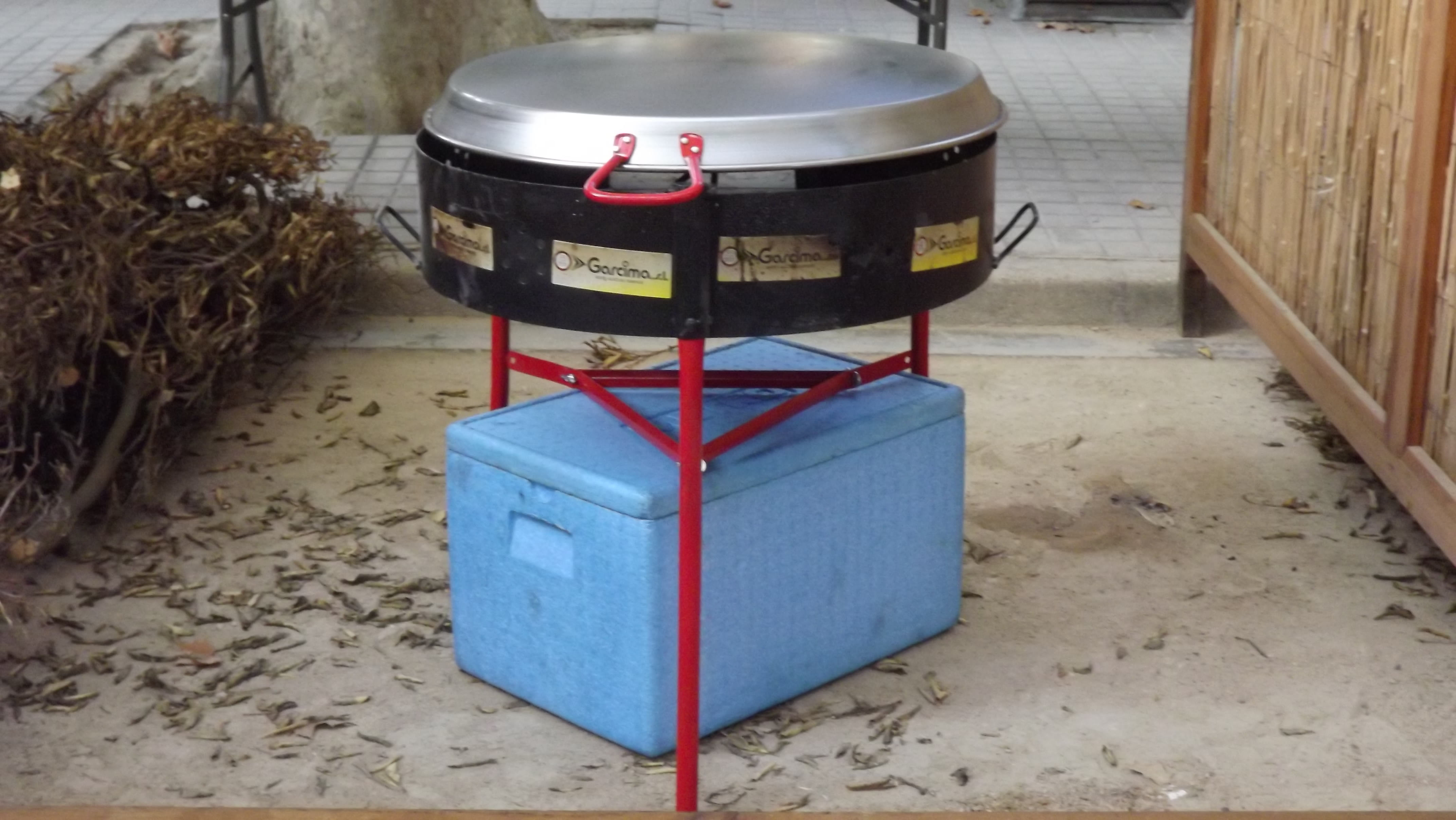 Kit para cocinar la paella